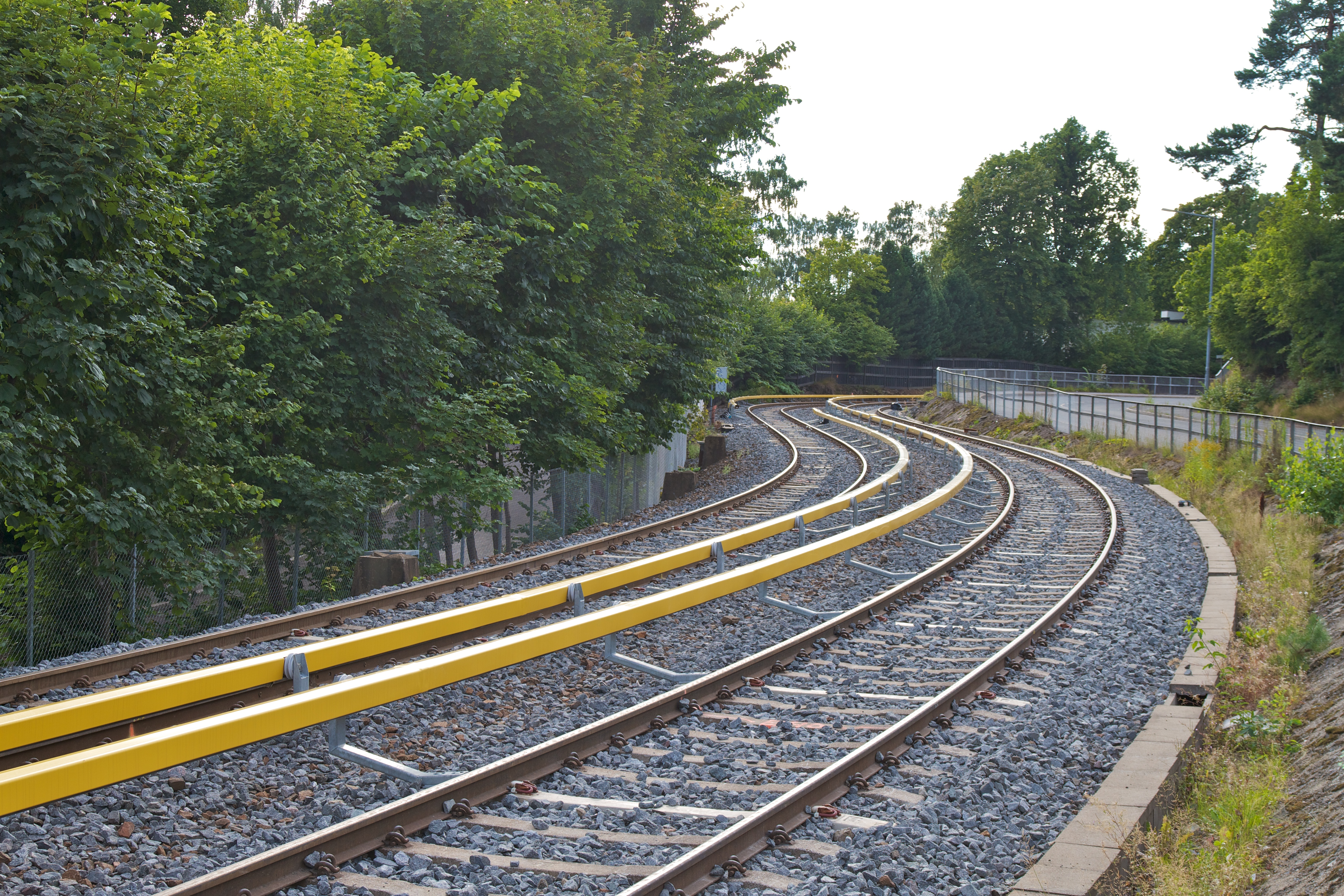 Holmenkollbanen ved Slemdalsveien, mellom Ris og Slemdal.